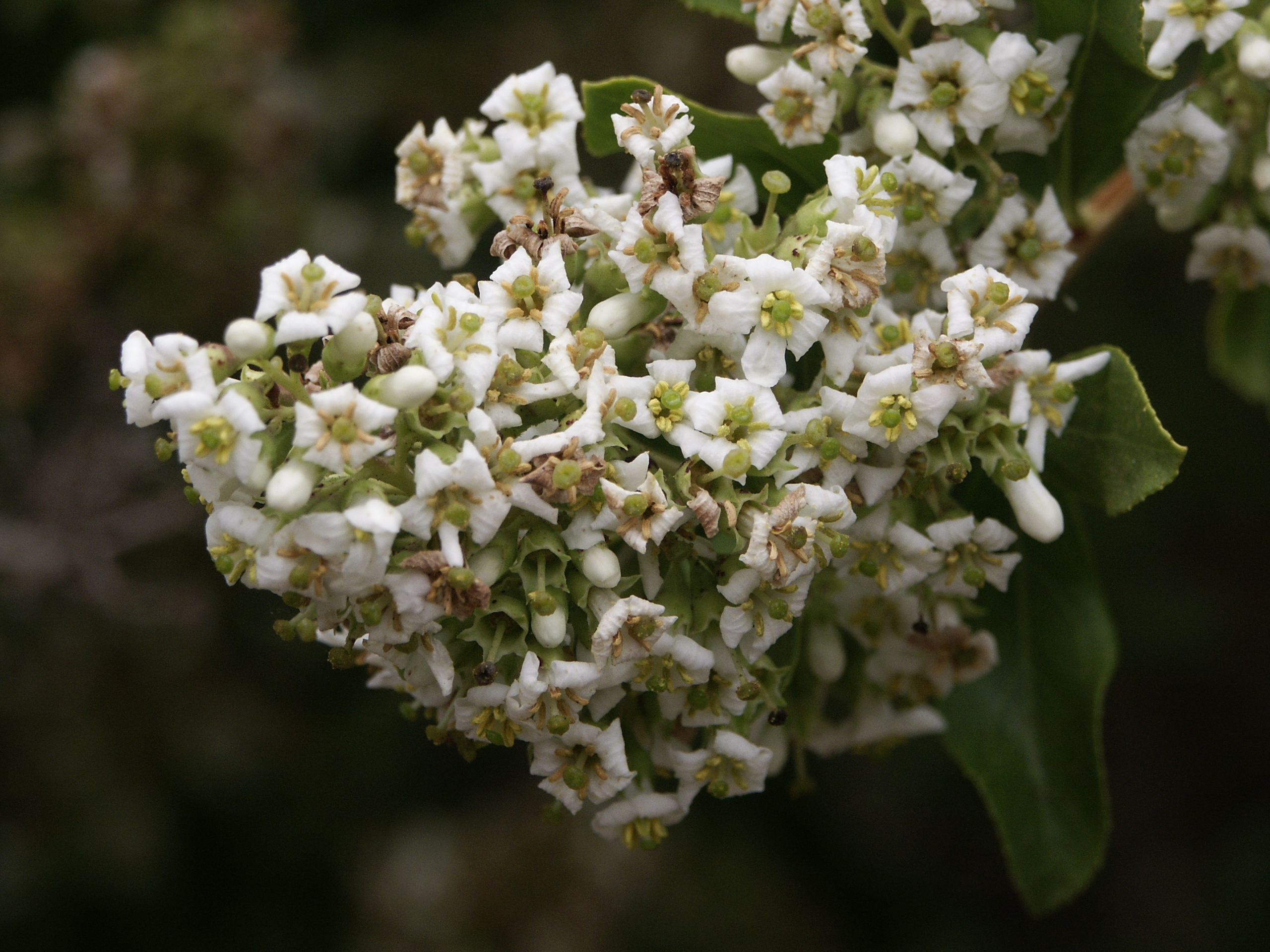 UC Bot. Garden, Berkeley, CA